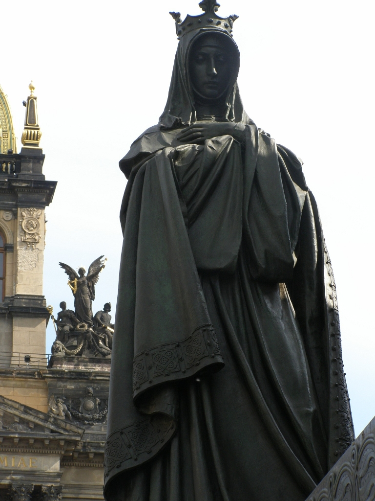 Socha sv. Anežky Přemyslovny od J. V. Myslbeka na pomníku sv. Václava na Václavskom námestí v Prahe